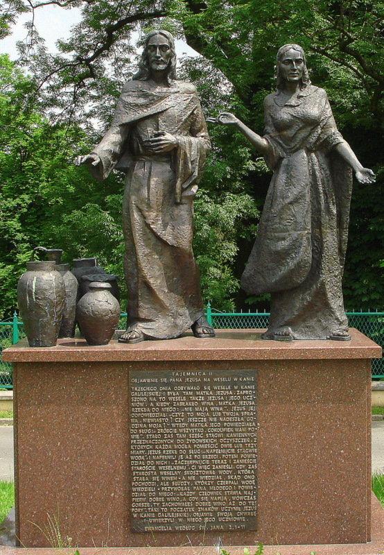 Częstochowa, zespół klasztorny paulinów na Jasnej Górze